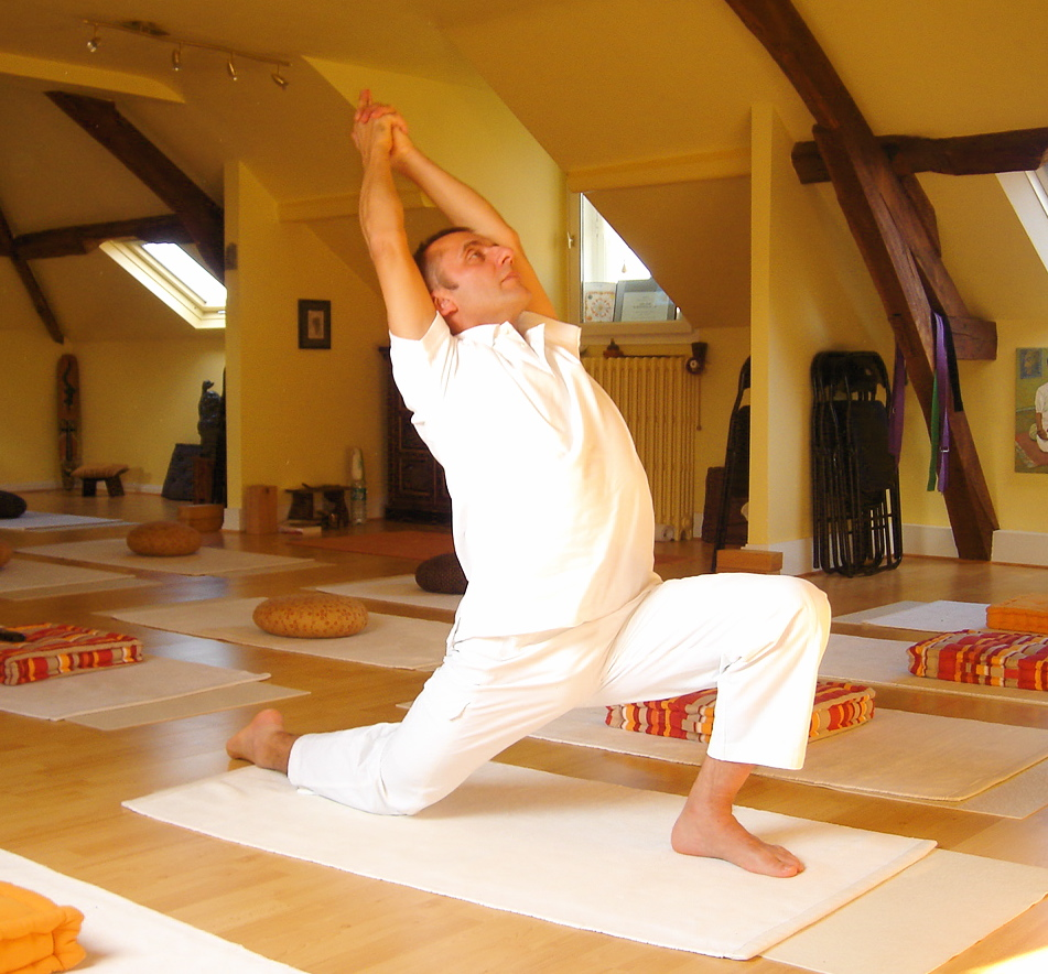 Yoga postures